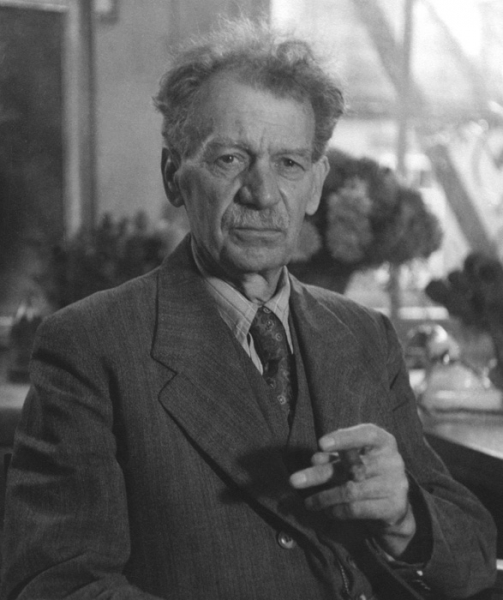 Emil Beutinger, Architekt und Oberbürgermeister der Stadt Heilbronn von 1921 bis 1933 sowie 1945/46